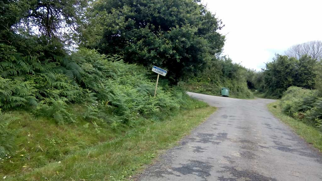 Vista do Codeso, Curtis.